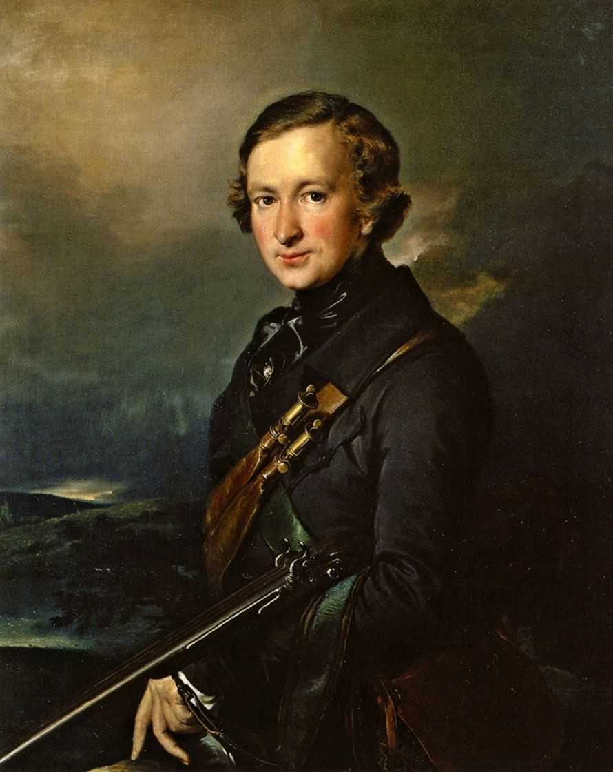 Самарин Юрий Федорович (в охотничьей одежде, 1846)